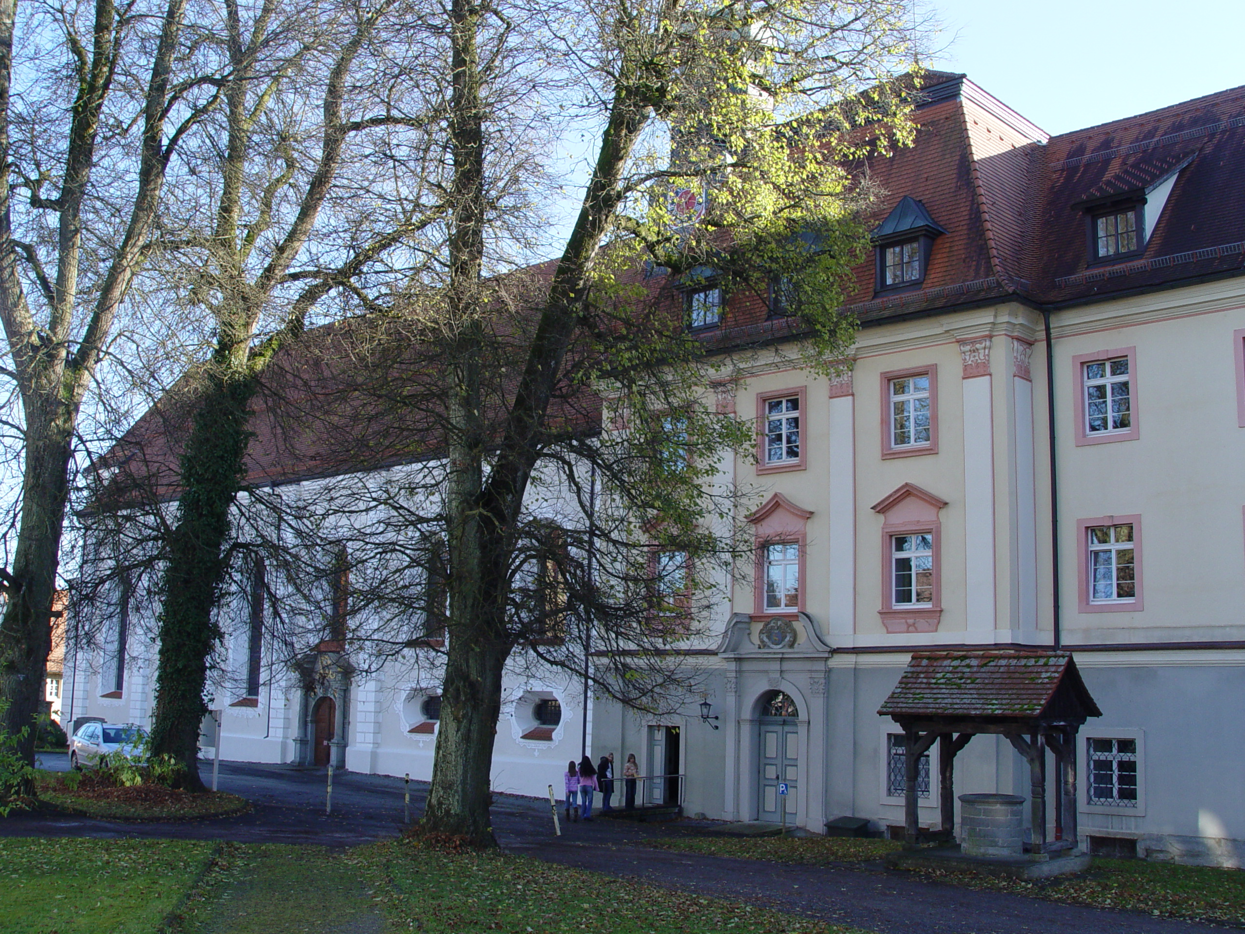 Bild selbst gemacht - own work Kloster Wald (Nordansicht) mit Klosterkirche in der Gemeinde Wald (Hohenzollern), Deutschland Photographed by : Zollernalb